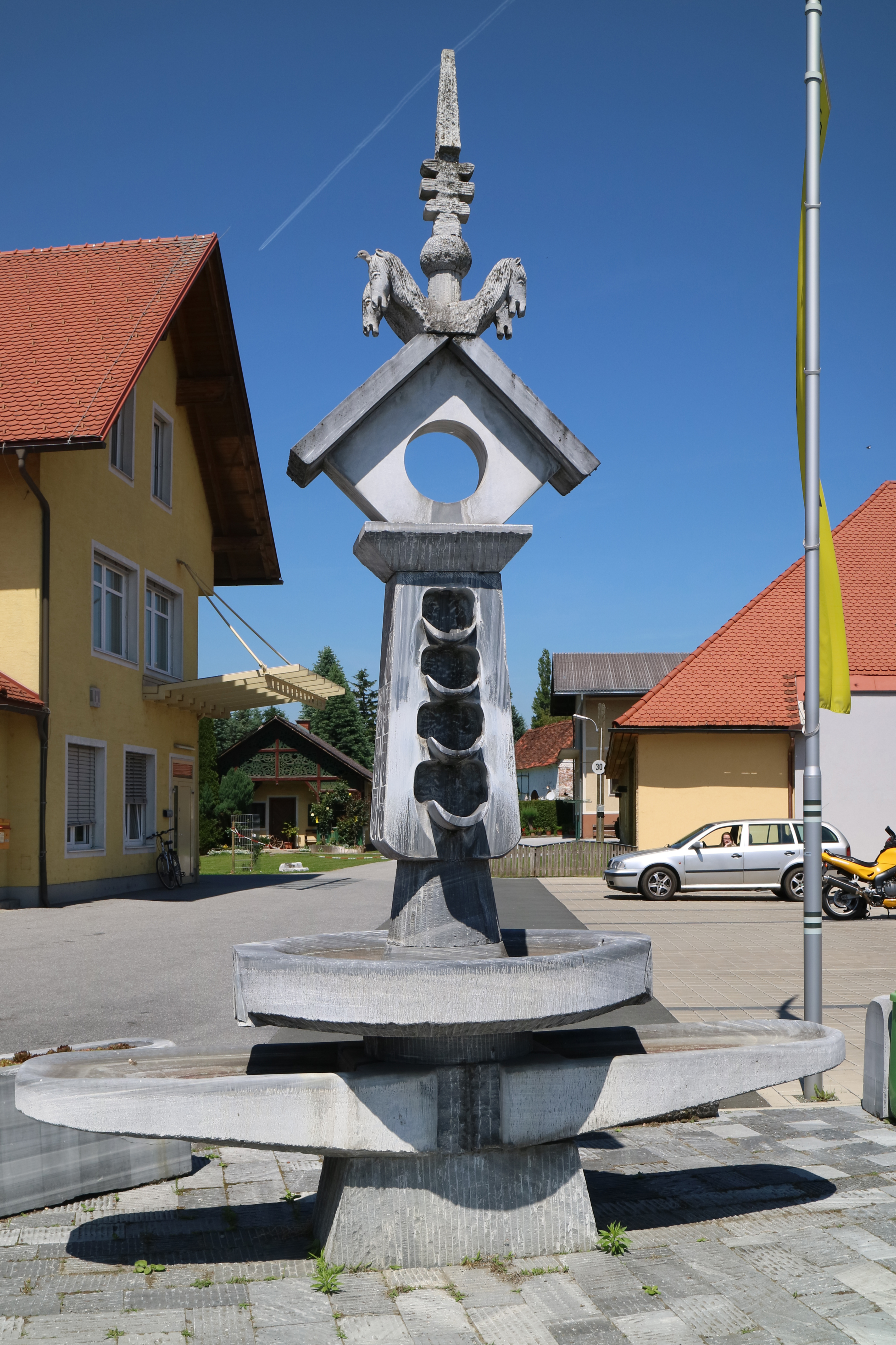 Dorfbrunnen in Krottendorf von Alfred Schlosser (1992)